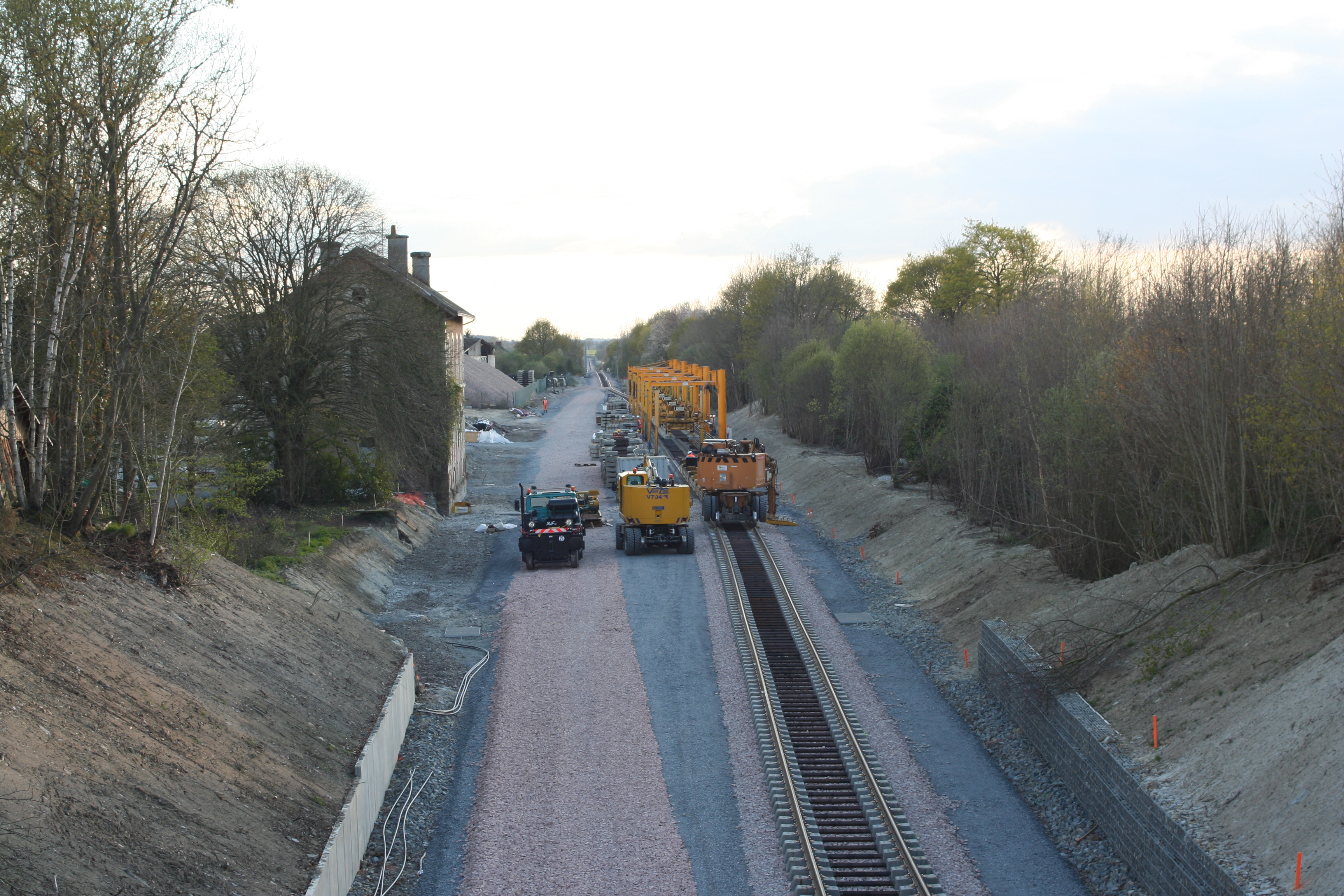 Travaux de reconstruction de ligne Nantes-Châteaubriant en gare d'Issé